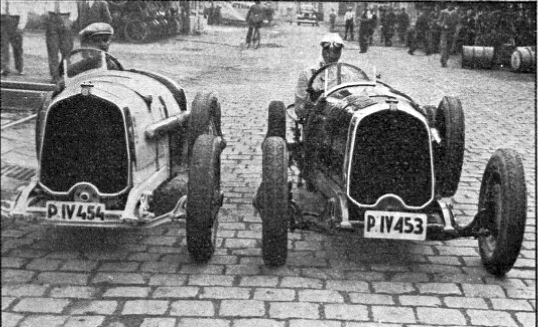 Wikov 7-28 Sport, Adam Szczyzycki - P IV453) a Jaroslav Konečník -P IV454 při odjezdu z továrny na Masarykův okruh (Auto, listopad 1932)